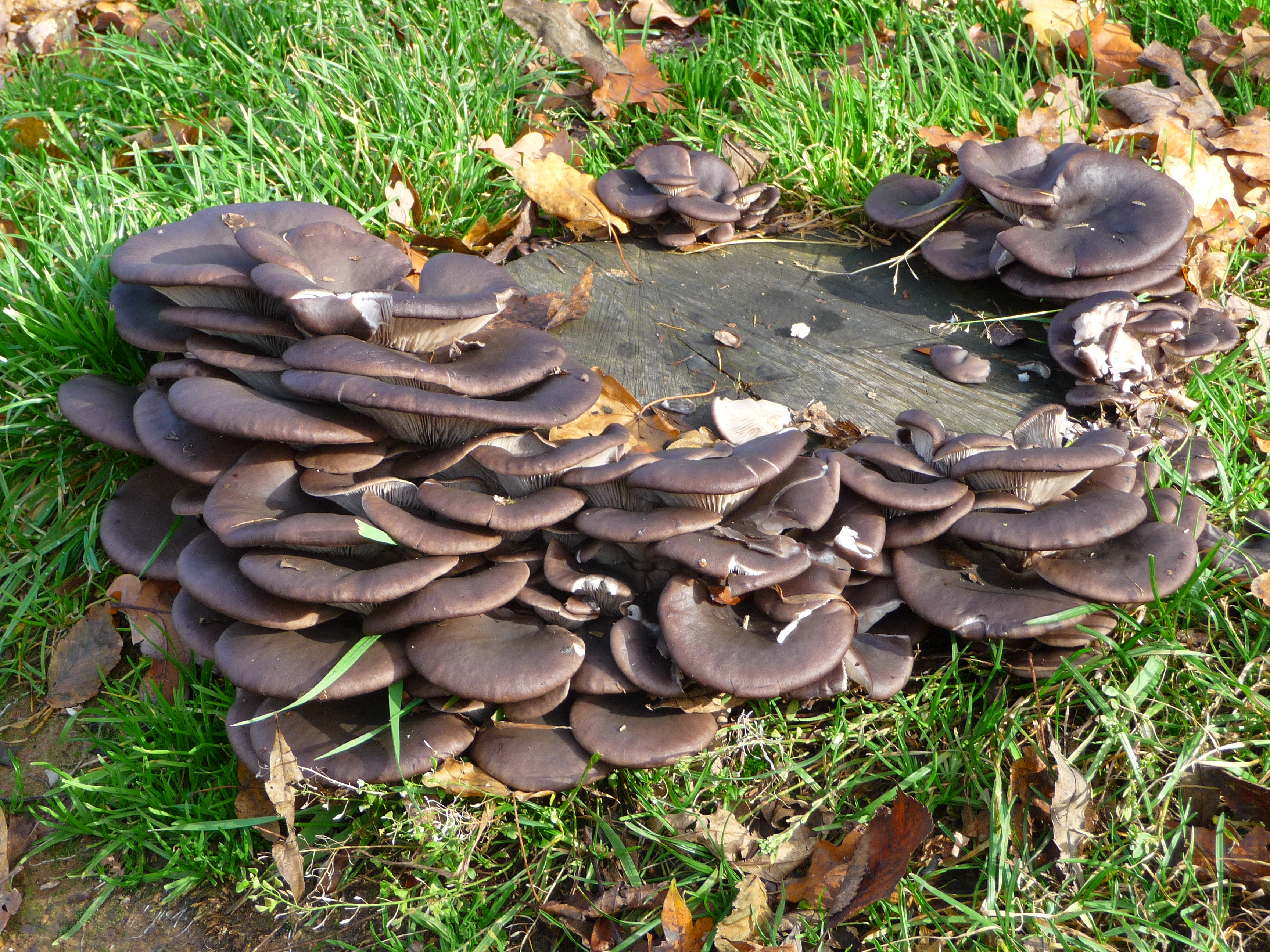 Pilze an einem Baumstumpf, fotografiert in Niedersachsen (Deutschland)